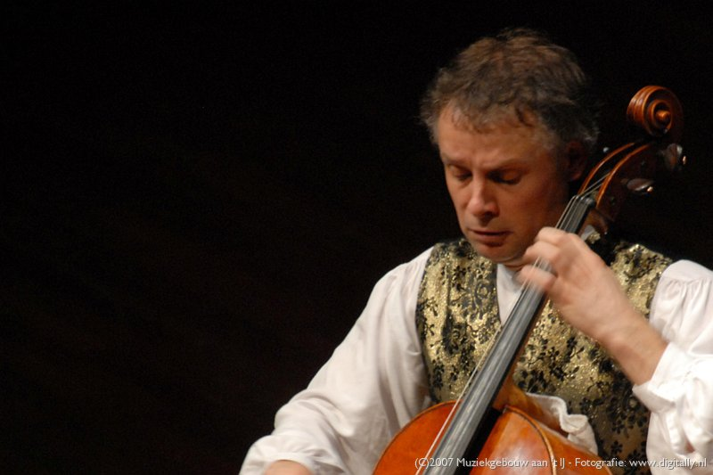 Pieter Wispelwey, Dutch cello player, 30 january 2007 Picture by Fai Ho, Dutch photographer. Licence information (in Dutch) Ik, Fai Ho, fotograaf te Amsterdam, bij Digitally.nl stel de afbeeldingen van Pieter Wispelwey en zijn begeleider Dejan Lazic, gemaakt op 30 januari 2007 in het Muziekgebouw aan het IJ ter beschikking onder een multi-licentie, dat wil zeggen onder zowel de GFDL als Creative Commons CC-BY-SA ( licentie. Ik ben de maker van deze foto's en beschik over het copyright. Zowel de heer Wispelwey als de heer Lazic hebben geen bezwaar tegen publicatie onder genoemde licenties. Mijn naam dient altijd als auteur bij de foto's te worden vermeld zoals de GFDL en de Creative Commons licenties voorschrijven. De toestemming voor het gebruik van deze mail is opgeslagen op OTRS van de Nederlandstalige Wikipedia, onder nummer OTRS nummer 2007041310008751